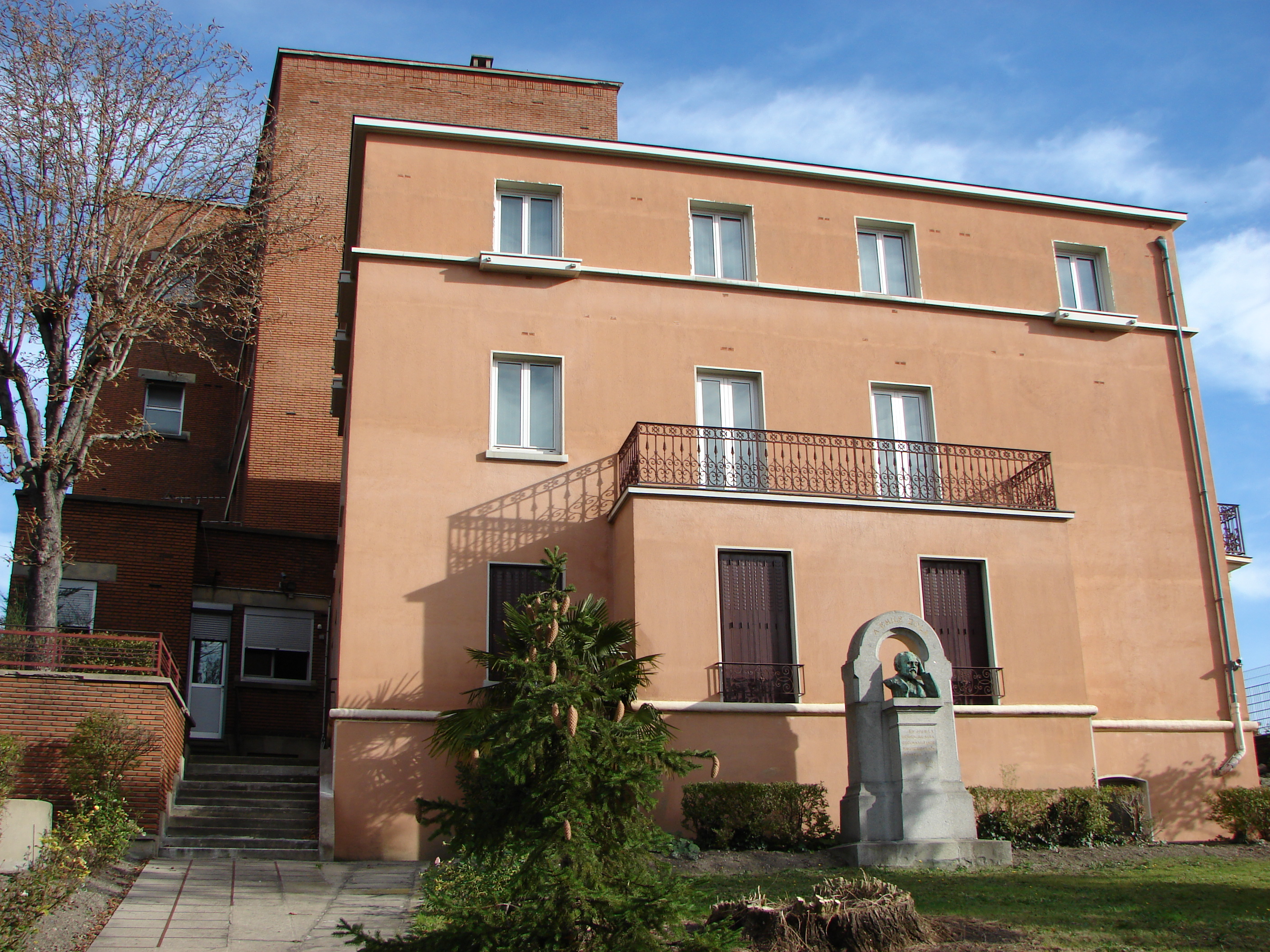 Bâtiment administratif du collège Émile Zola situé au 46 rue Franklin Roosevelt à Suresnes